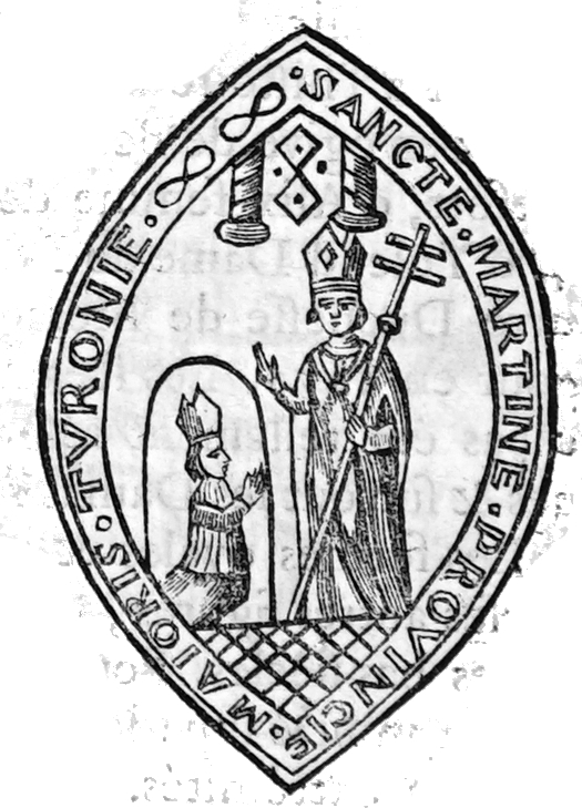 lors du Concert d'inauguration de la rosace de la cathédrale de Reims.